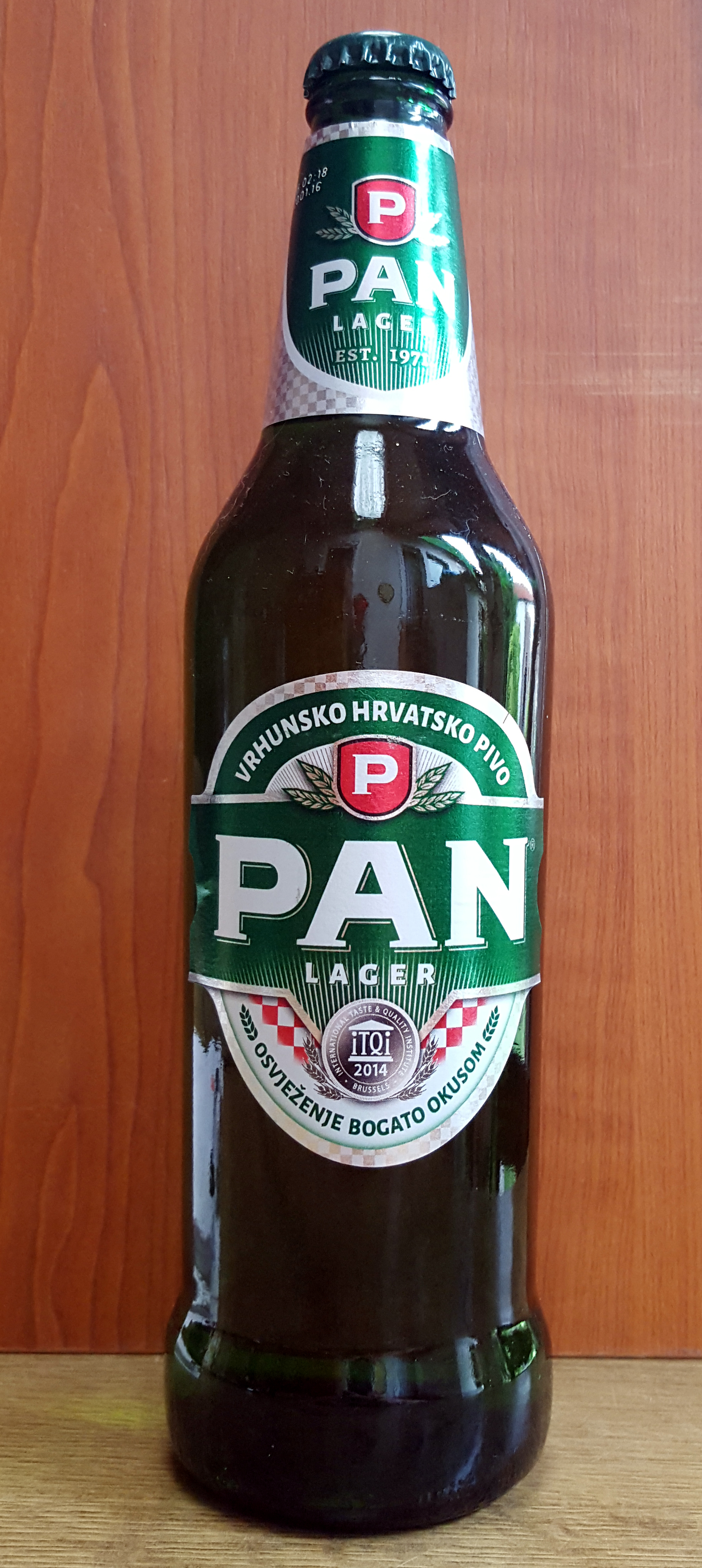 Pan Lager - Pivo Pan, Koprivnička pivovara